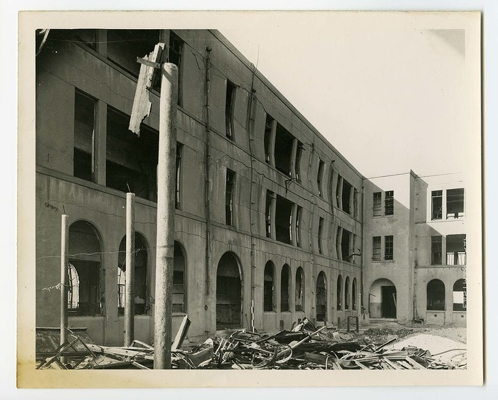 被爆後の本川小学校